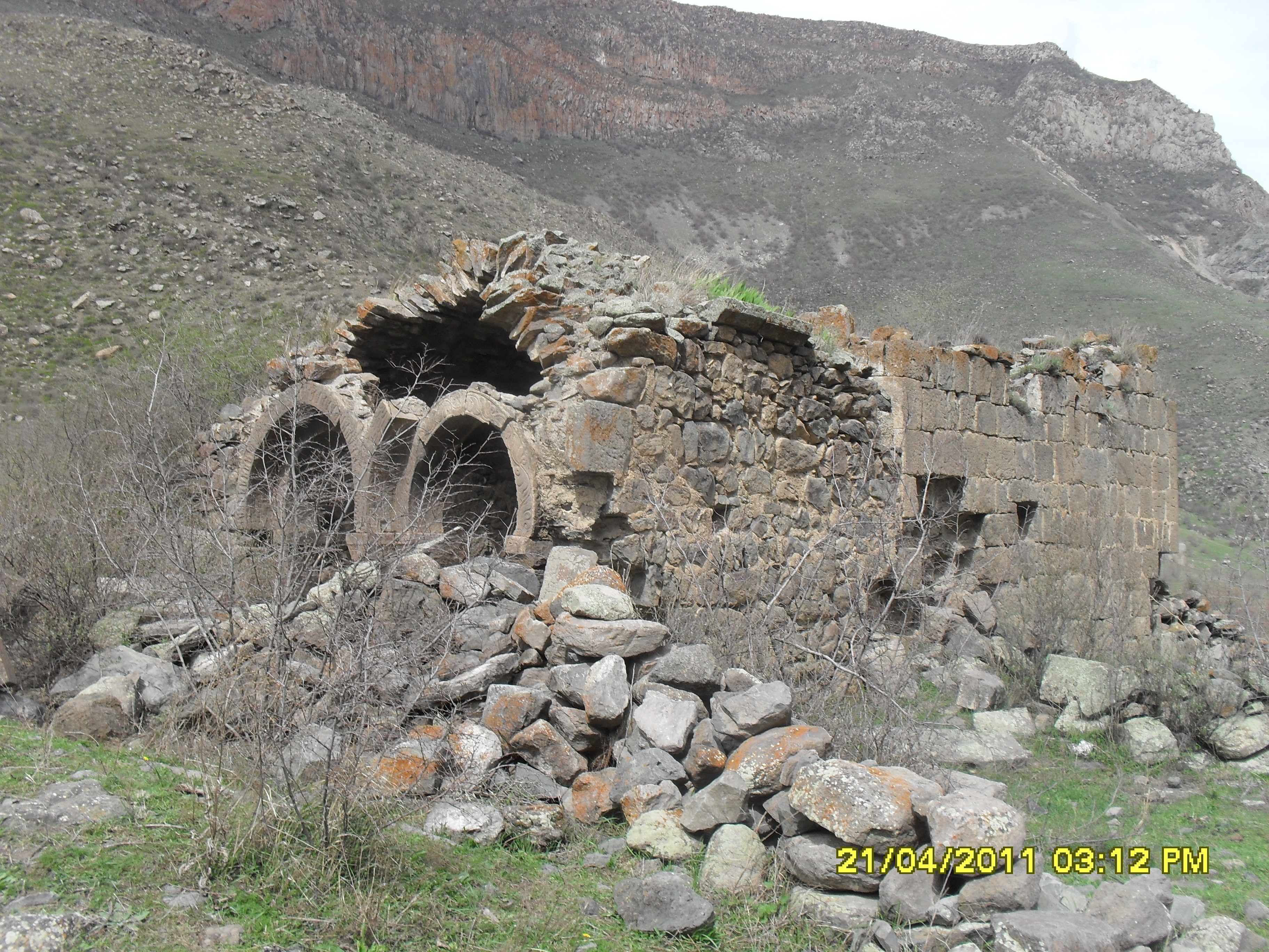 "Ալան թագավորի" եկեղեցի 13-14դդ 56/7.2